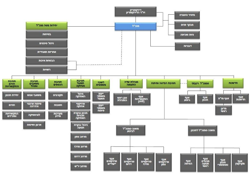 מבנה ארגוני של חברת נתיבי ישראל